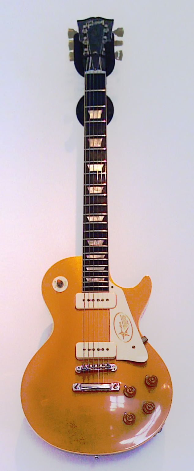 Gibson Les Paul Goldtop '56 reissue